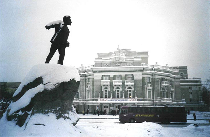 Photo d'Ekatérinbourg enneigée Photo personnelle. Sandrine 8 mar 2004 à 21:32 (CET) Photo libre d'utilisation, sous GFDL